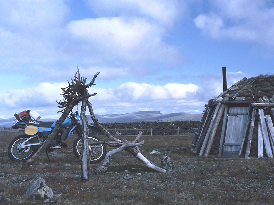 Moto-Cross Motorrad neben einer Kåta der Saami bei der Rentierscheidung in der Nähe von Nikkaluokta